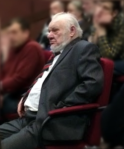 Ю. Г. Пузаченко на праздновании 120-летия со дня рождения П. П. Смолина